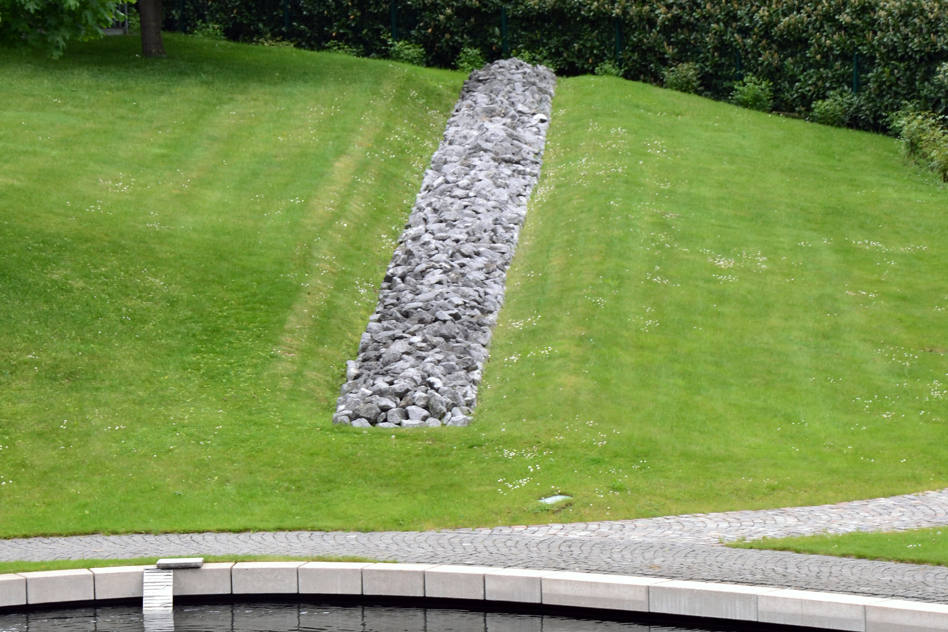 Plastik "Neandertal Line" von Richard Long am RWE-Turm in Essen